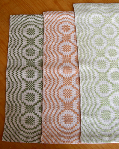 Daldräll med olika inslagstäthet. Se även duk i daldräll